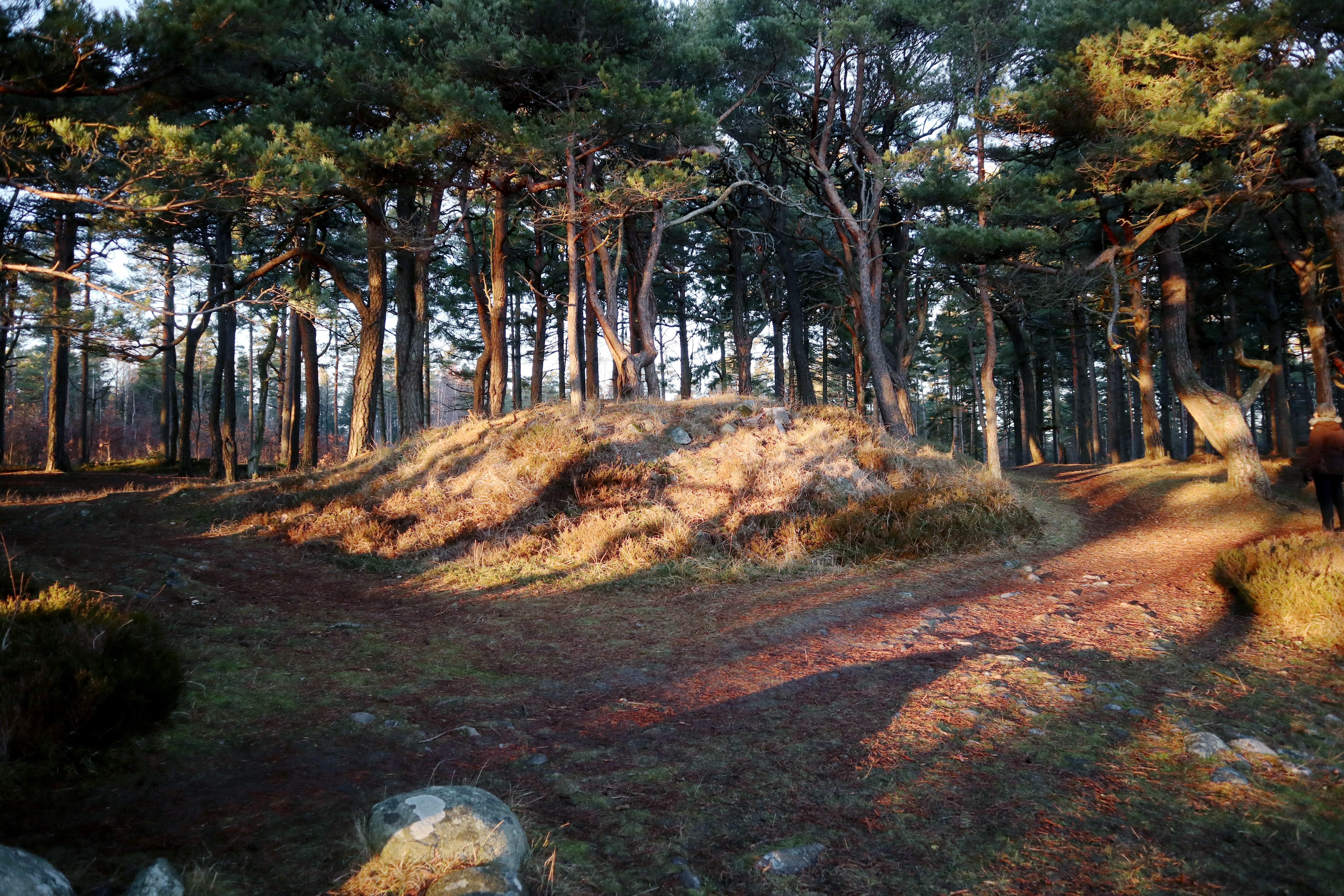 Hoveskogen gravhaug